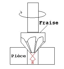 Schéma d'une fraise à chanfreiner (chanfrein sur un trou).